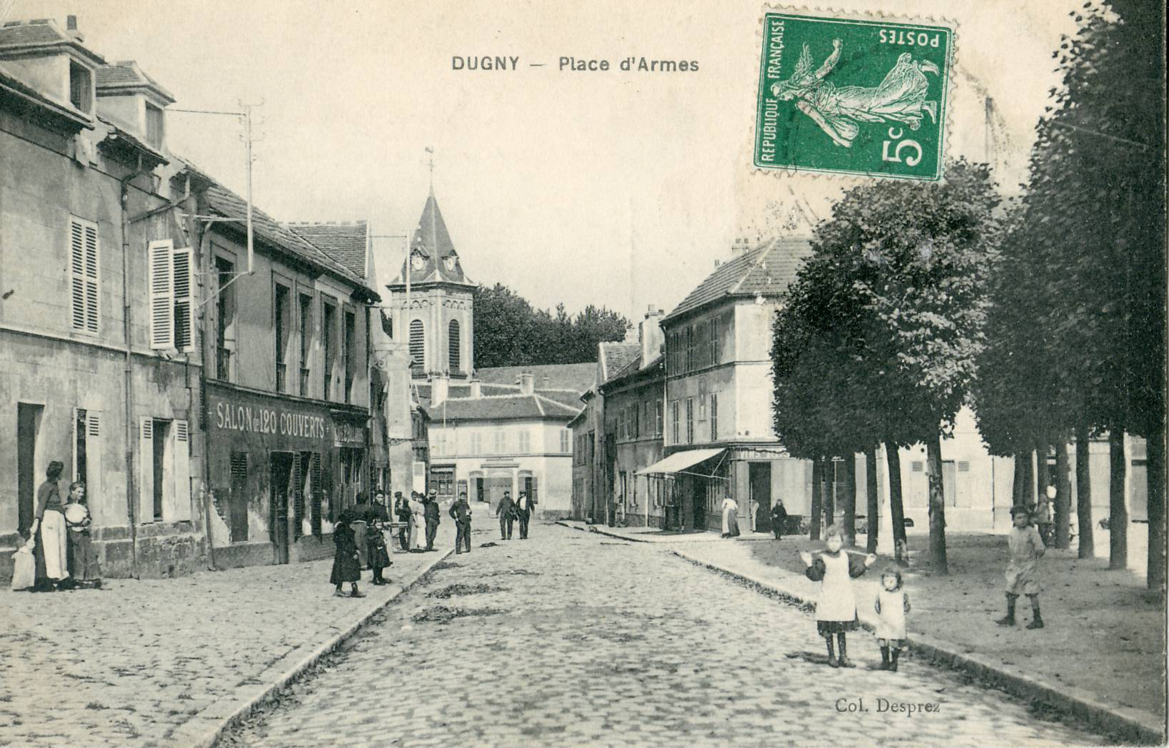 Carte postale ancienne éditée par DesprezDUGNY : Place d'Armes